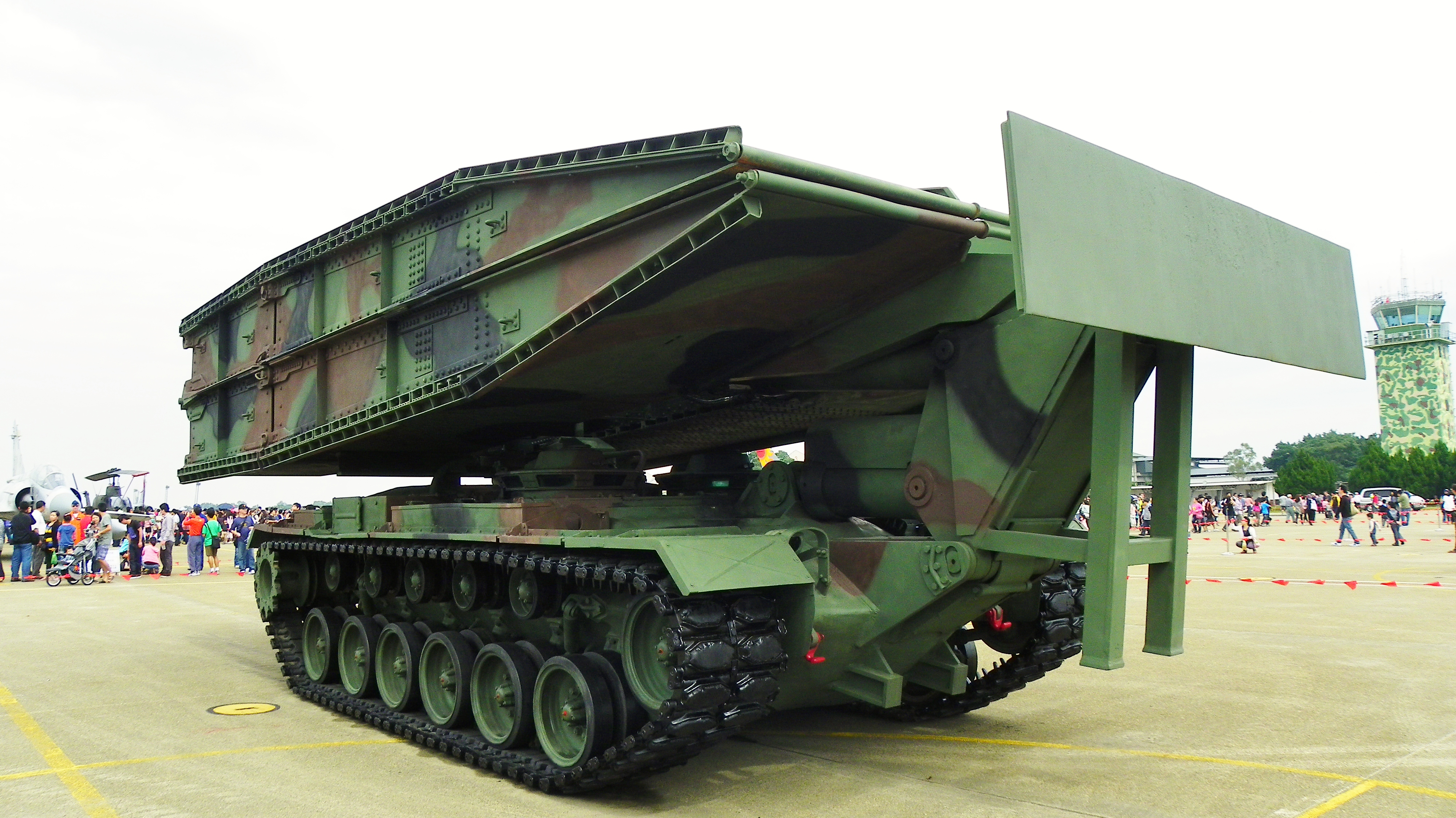 中華民國陸軍M48A5履帶機動橋，攝於2011年清泉崗空軍基地營區開放活動。